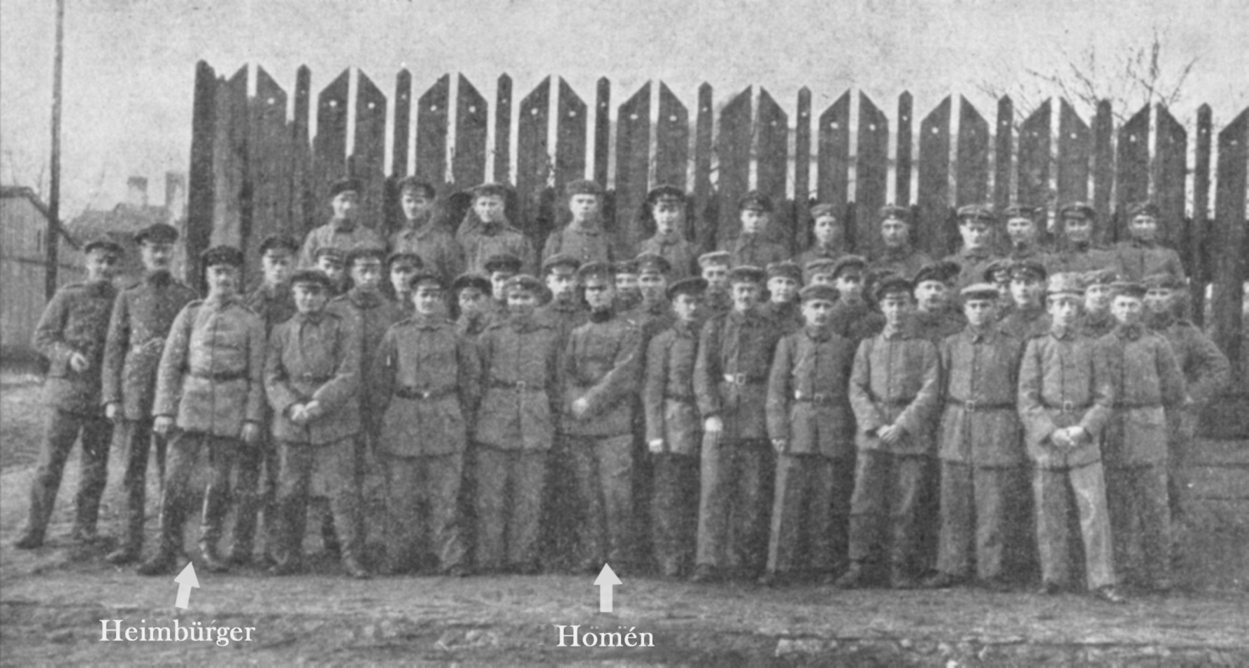 Description